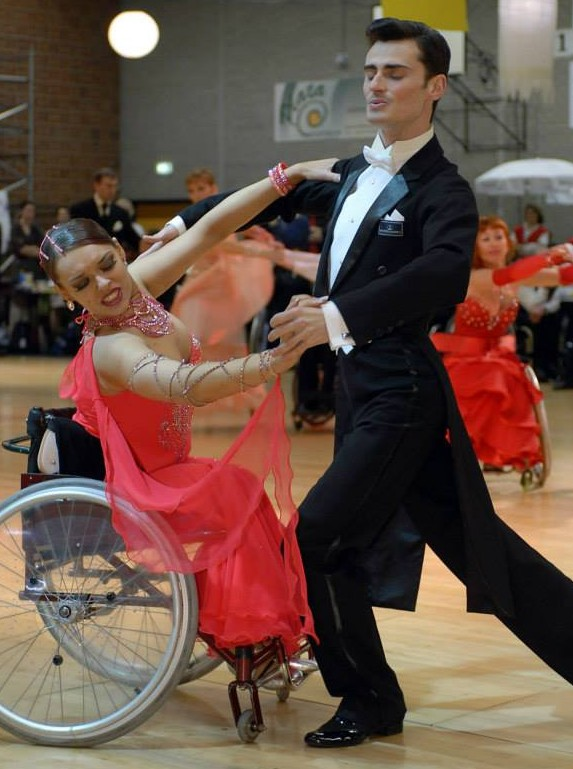 Украинский танцевальный дуэт Александр Иванов и Иллона Слуговина. Многократные Чемпионы мира и Европы по спортивным танцам на колясках. Мастера спорта международного класса. Спортклуб "Березиль", г.Киев, Украина.